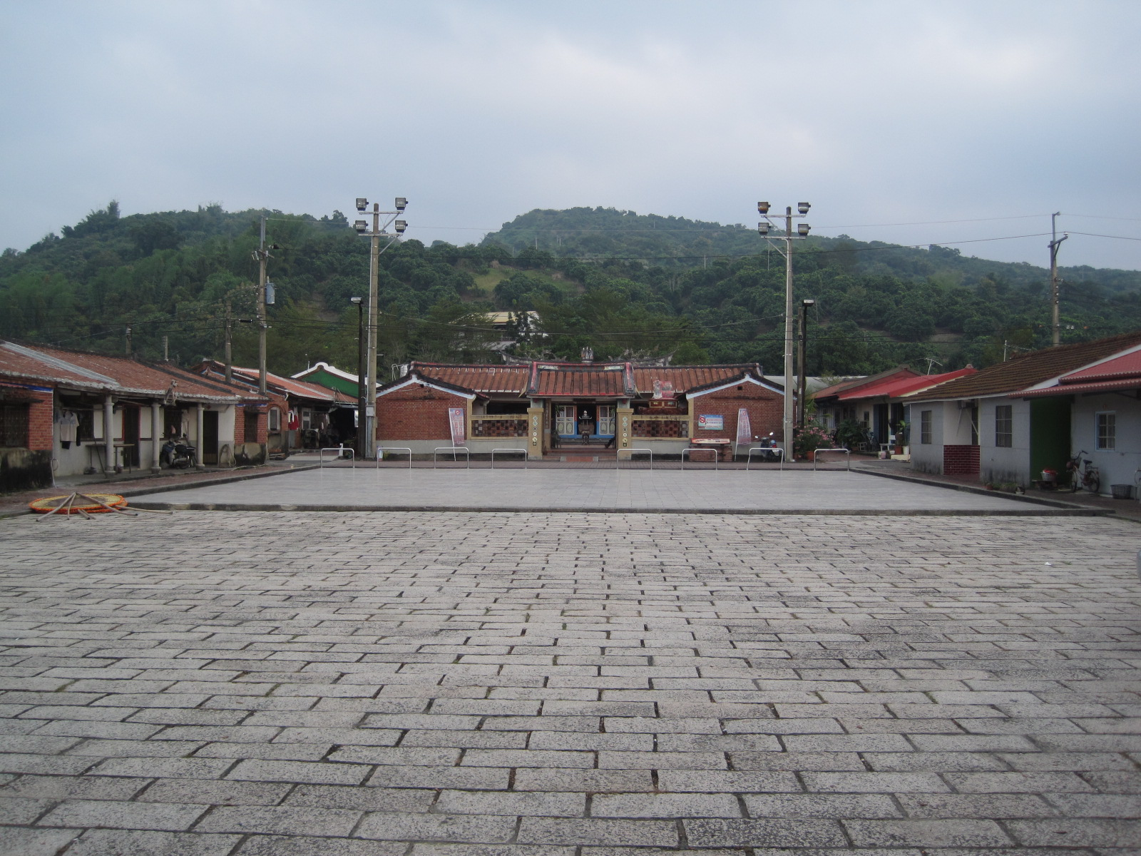 臺南市楠西區的鹿陶洋江家聚落